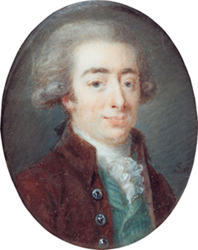 Self-portrait